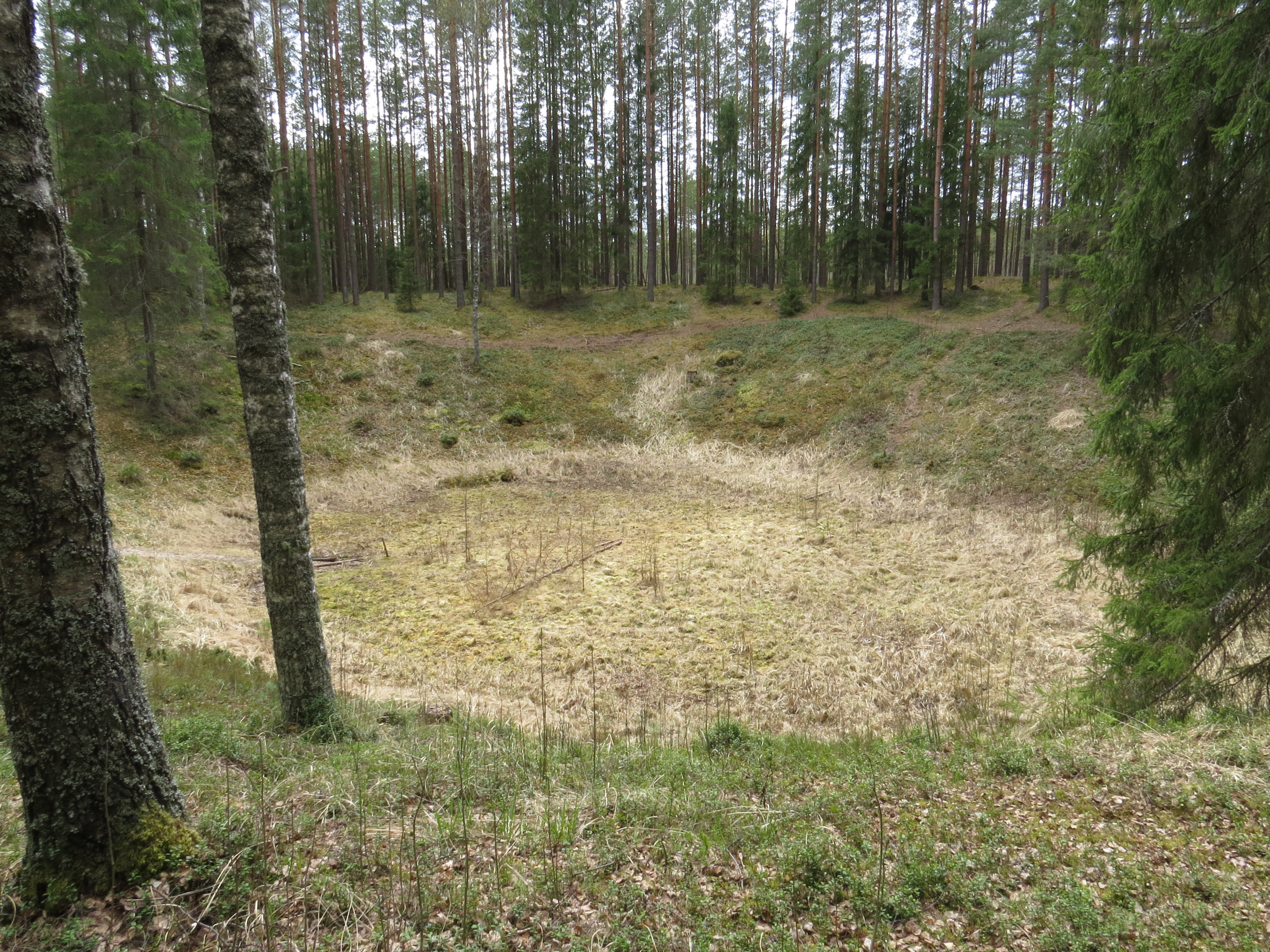 Ilumetsa kraatrid